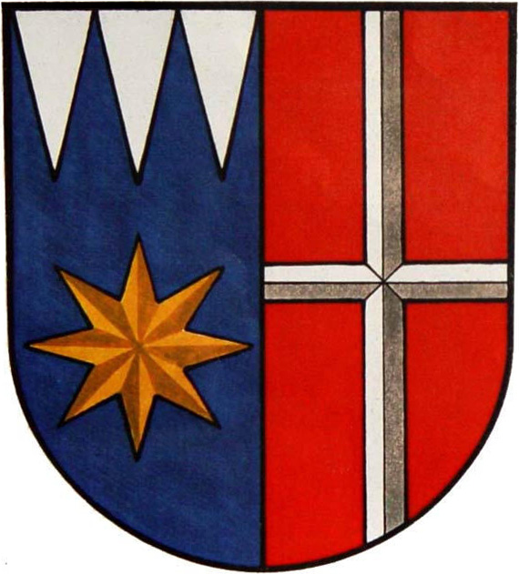 Znak obce Mysločovice. Blason: V modro-červeně polceném štítě vpravo pod třemi zkrácenými stříbrnými klíny zlatá osmihrotá hvězda, vlevo stříbrný heroldský kříž. Zkrácený popis podle webu obce: Nový znak byl sestaven z erbů a symbolů šlechtických rodů, kterým obec v minulosti patřila, vyjadřuje však také polohu a charakter samotné obce. Osmicípá šternberská hvězda v modrém podkladu symbolizuje skutečnost, že obec byla od roku 1397 součástí panství Šternberků a současně znamená svou barvou příslušnost katastru obce do oblasti Hané, pro kterou je zlatá barva vlnícího se obilí příznačná. Stříbrný kříž na červeném podkladu patřící rodu Rottalů je také znakem obce, která je odedávna pro svou polohu křižovatkou a střediskovou obcí. Tři stříbrné kužely v modrém poli symbolizují, že obec byla majetkem olomouckého biskupství a mohou také připomínat Trojici boží z obecní pečetě.